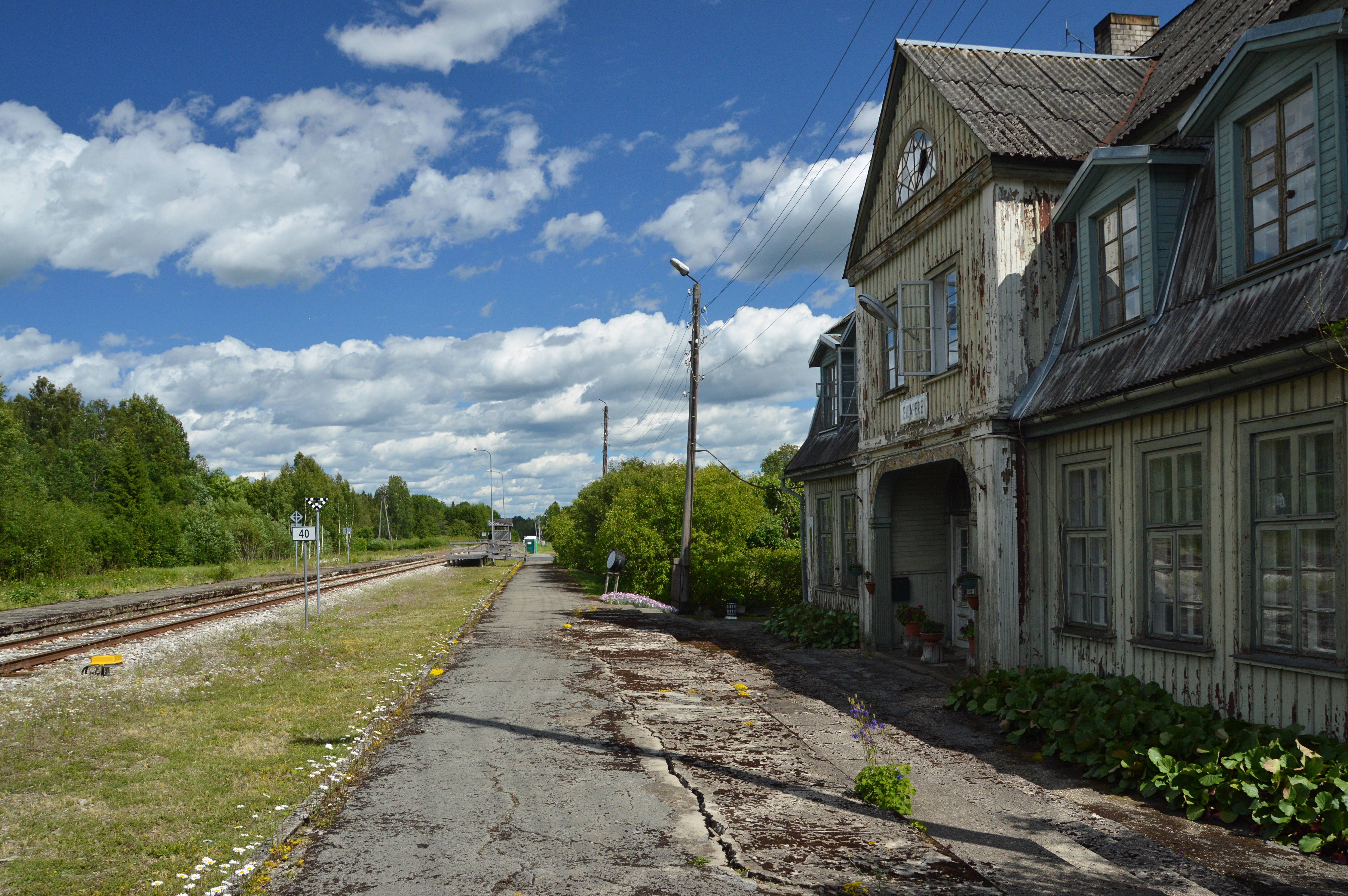 Eidapere raudteepeatus ja jaamahoone.